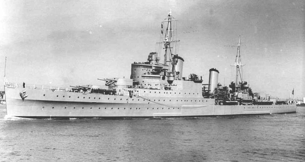 Der britische Leichte Kreuzer HMS GLASGOW (C21)